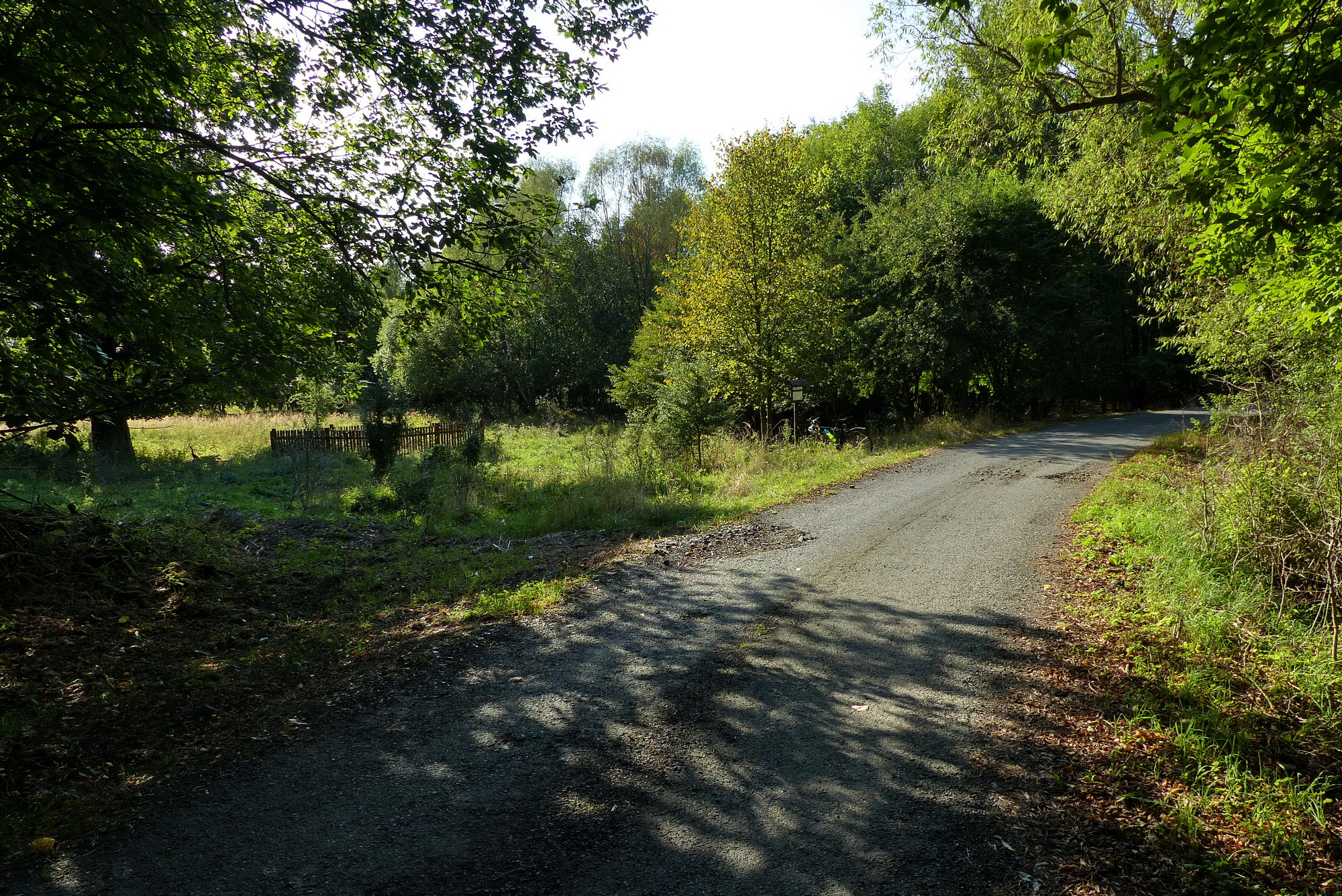 Silnice skrz bývalou Olšinu